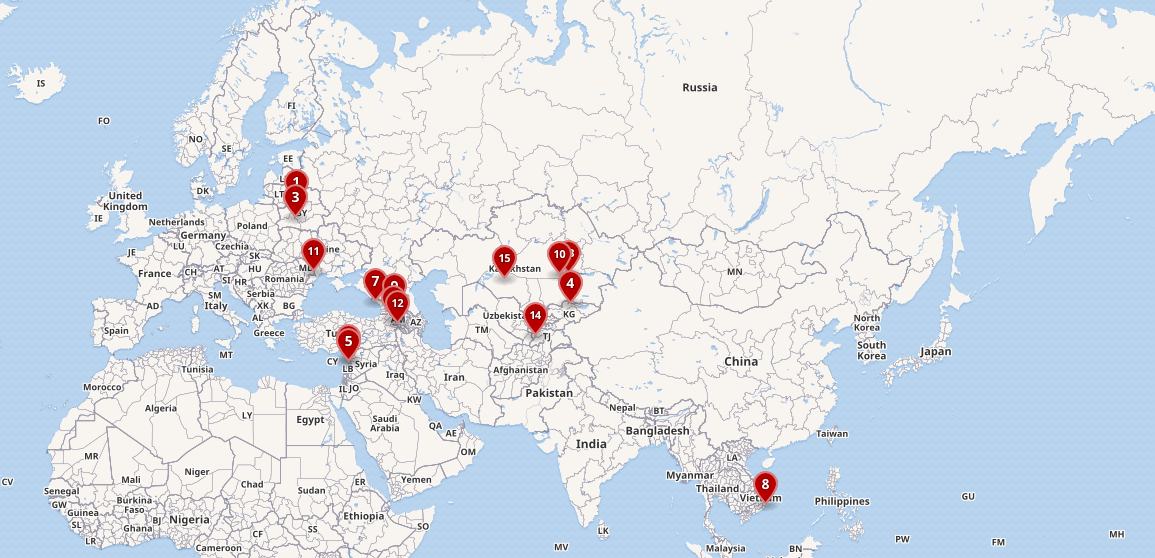 Le basi militari della Federazione Russa all'estero